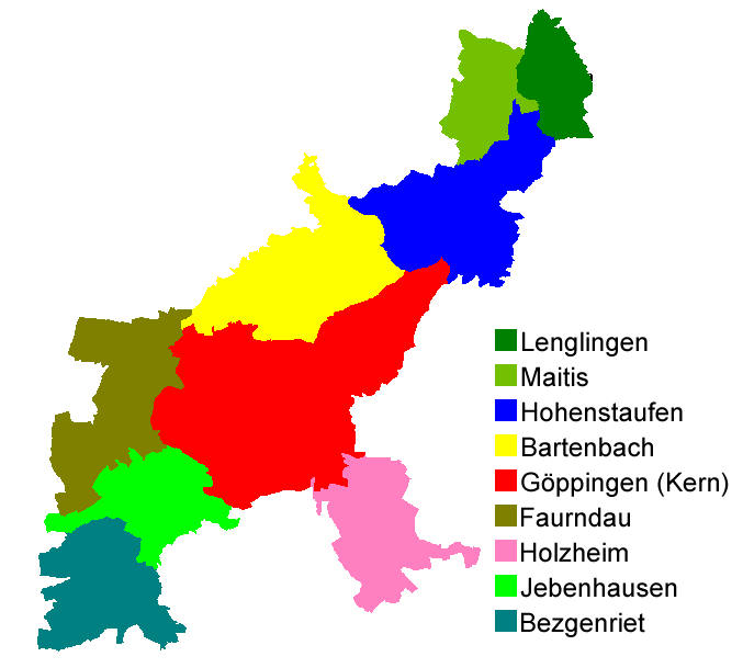 Göppinger Stadtbezirke